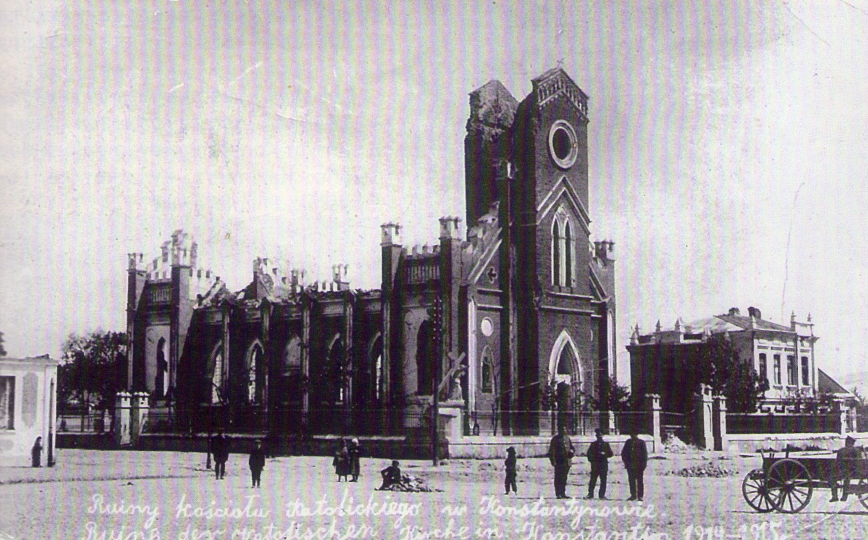 Zdjęcie zniszczonego kościoła po ostrzale artyleryjskim z roku 1915